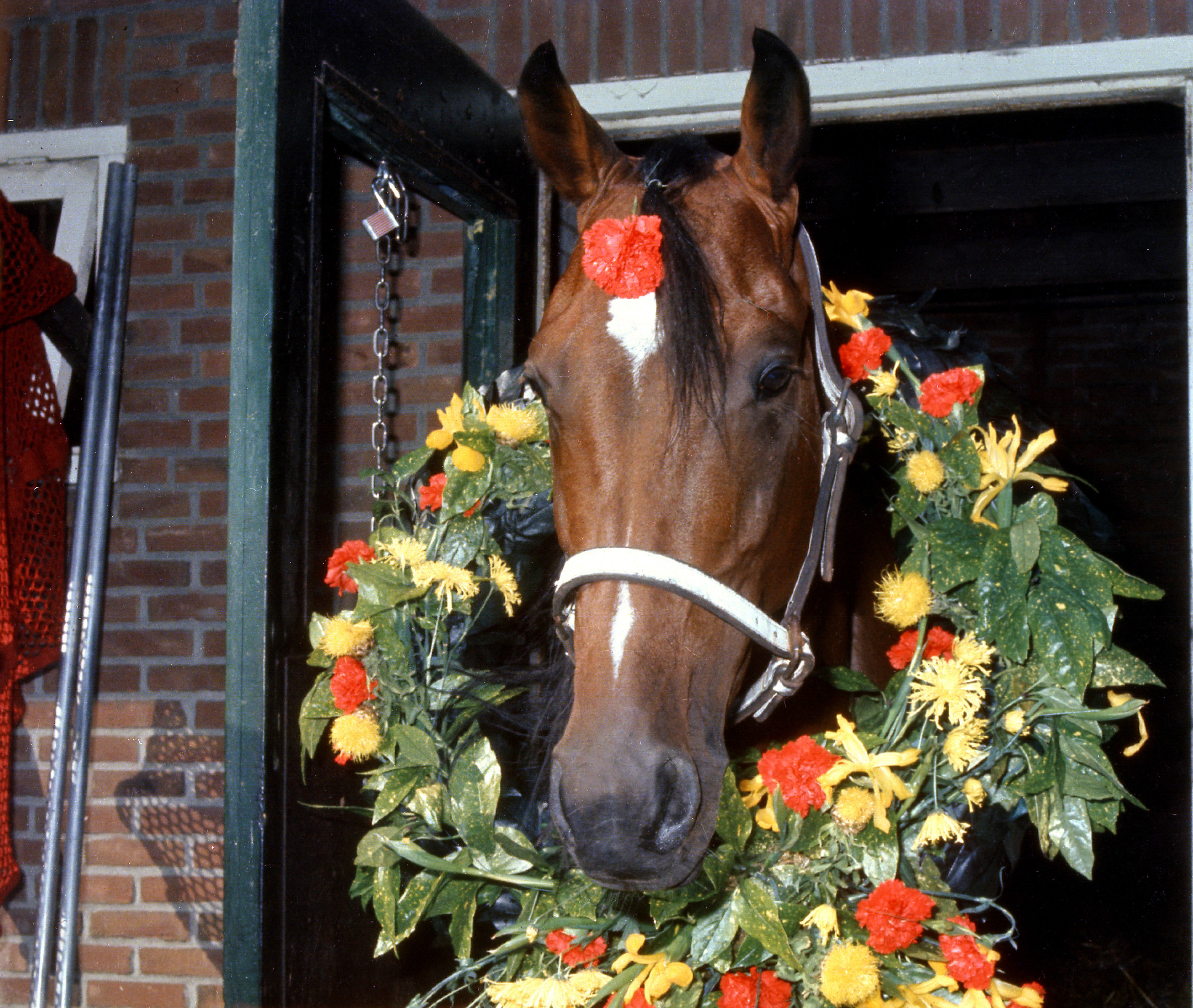 Travhästen Ego Boy efter att ha vunnit Grote Prijs der Lage Landen i Nederländerna 1973.